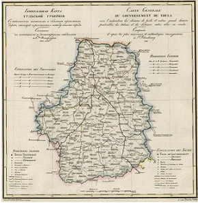 Древняя карта тульской губернии